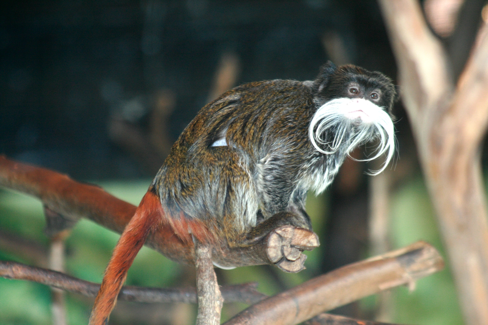 Emperor Tamarin